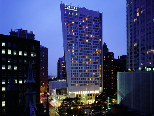 Hôtel Sofiterl WATER TOWER à Chicago